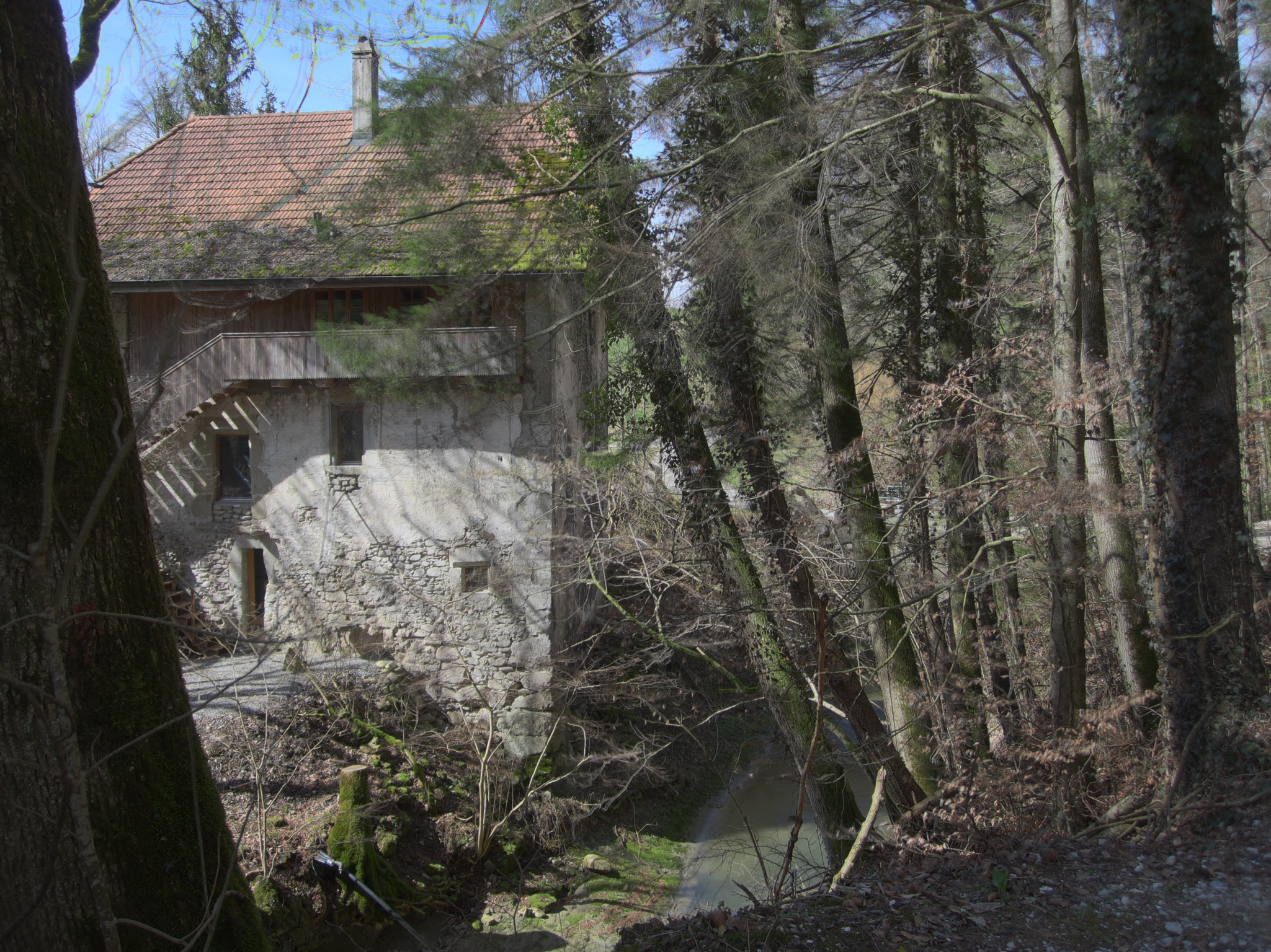 Altes Mühlegebäude im Galterntal auf dem Gemeindegebiet von St. Ursen